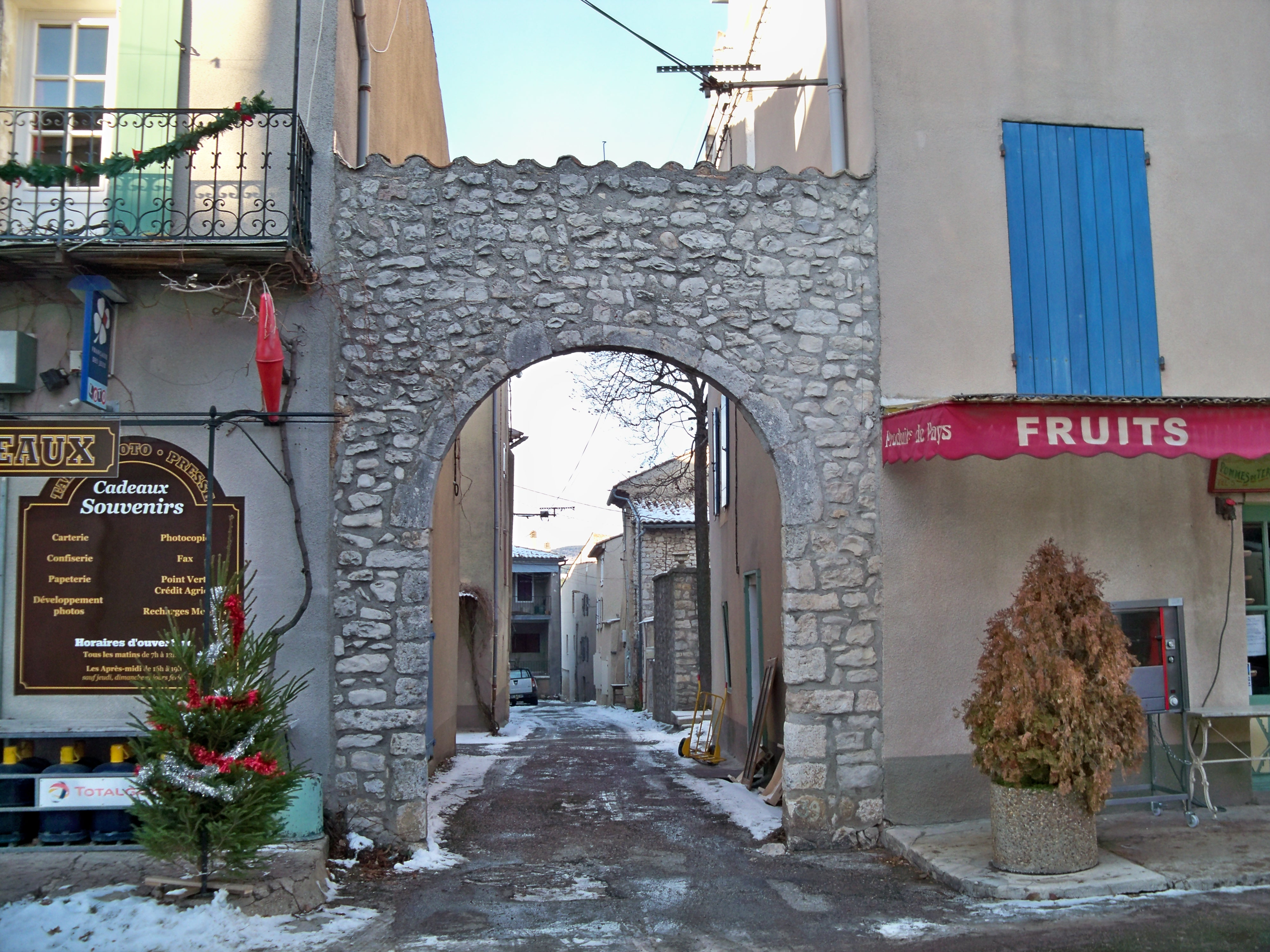 Porte des anciens remparts de Revest du Bion (04)